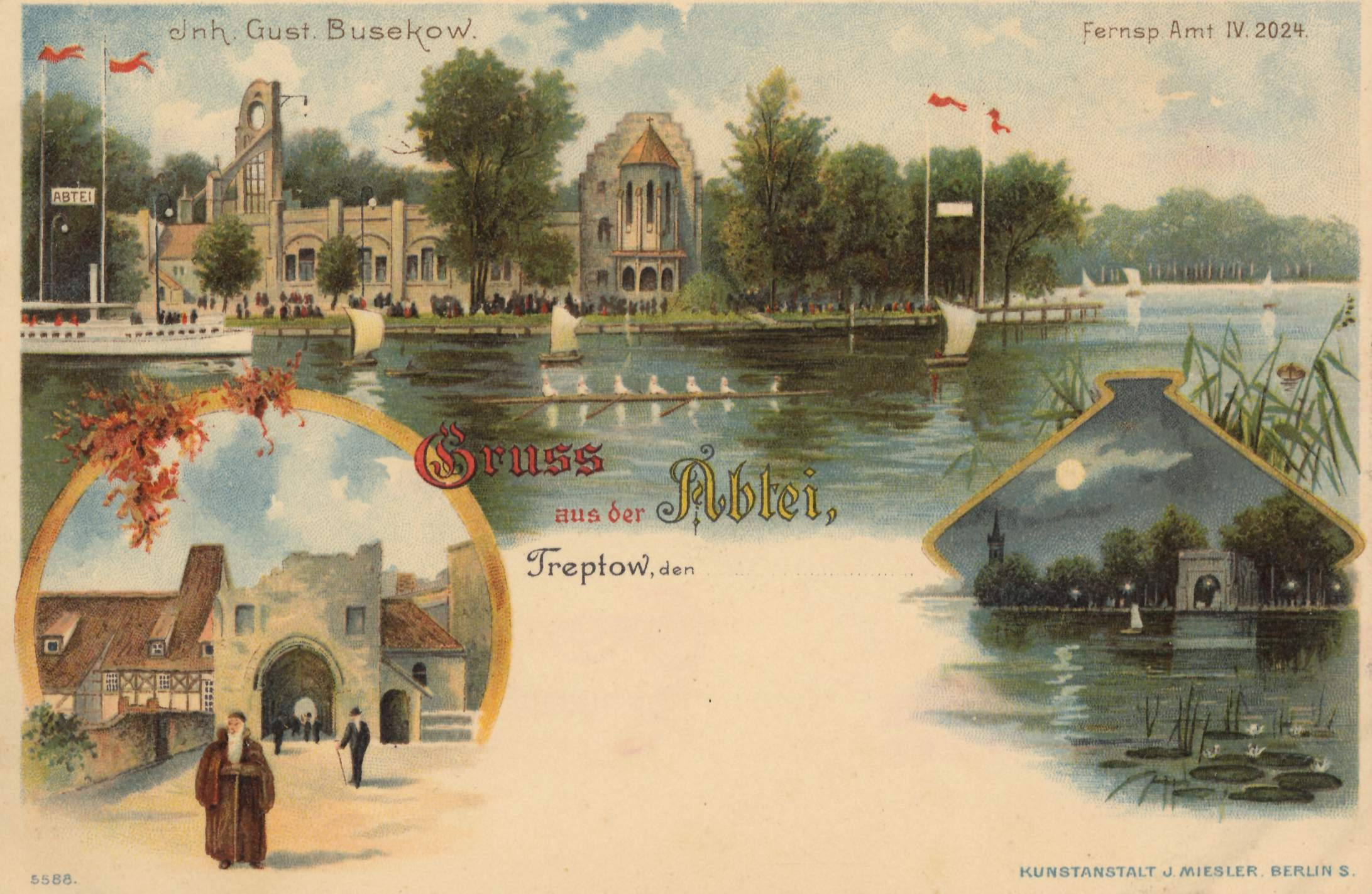 Das anlässlich der Berliner Gewerbeausstellung 1896 errichtete Restaurant Abtei auf der heutigen Insel der Jugend in Berlin-Alt-Treptow. Das Gebäude ist 1914 abgebrannt.